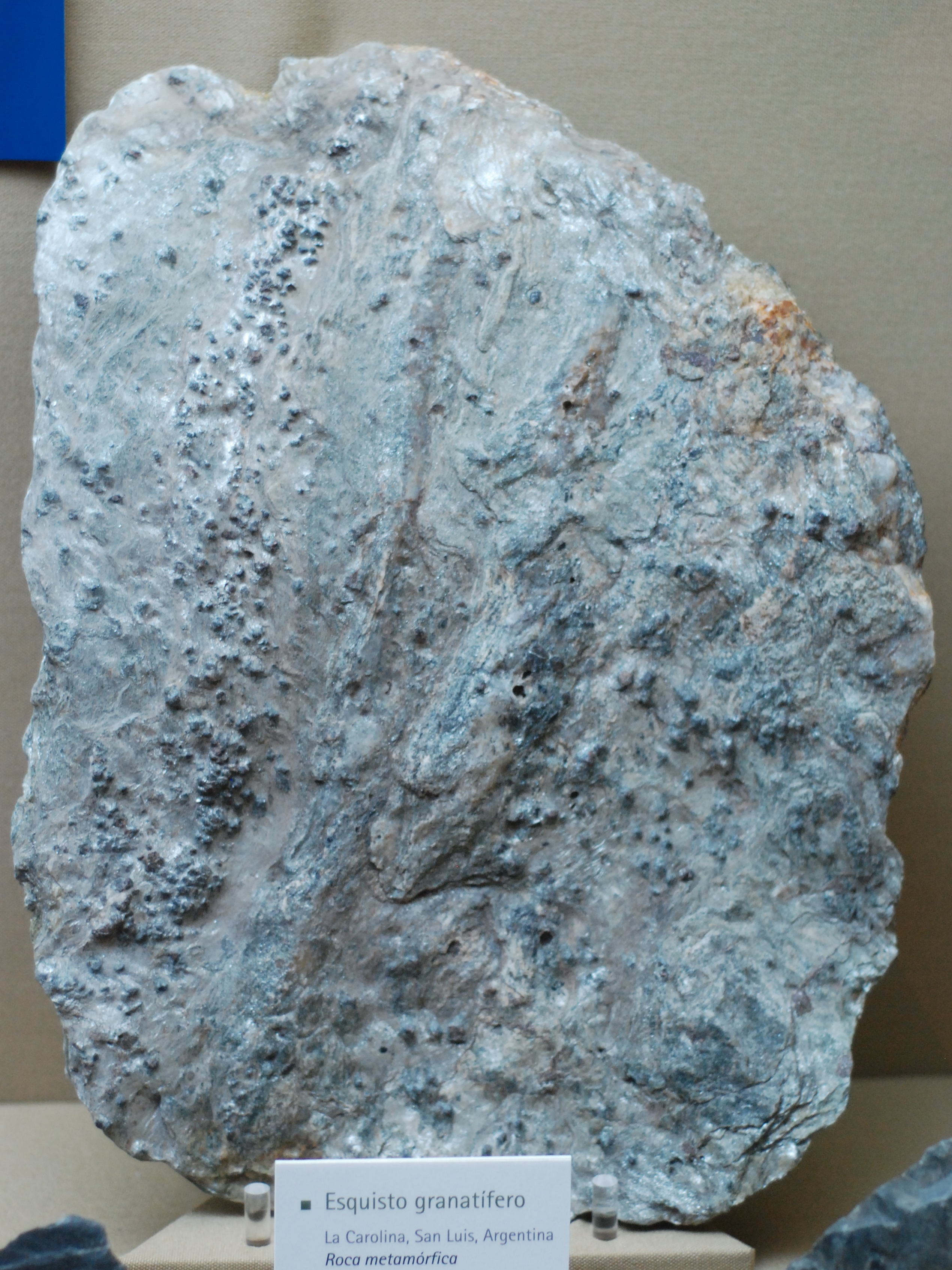 Esquisto granatifero. Roca metamórifica Los planos, la presencia de micas y las motas de cristales de granites indican condiciones de alta temperatura y presión La Carolina, San Luis, Argentina